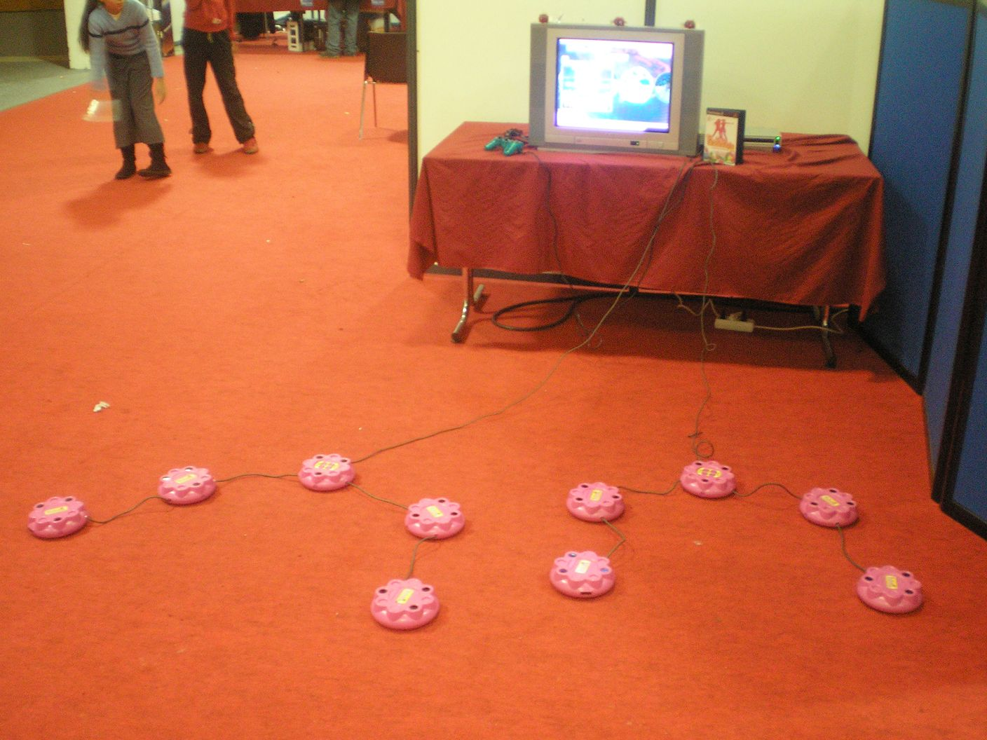 Deux Set de plots Para Para